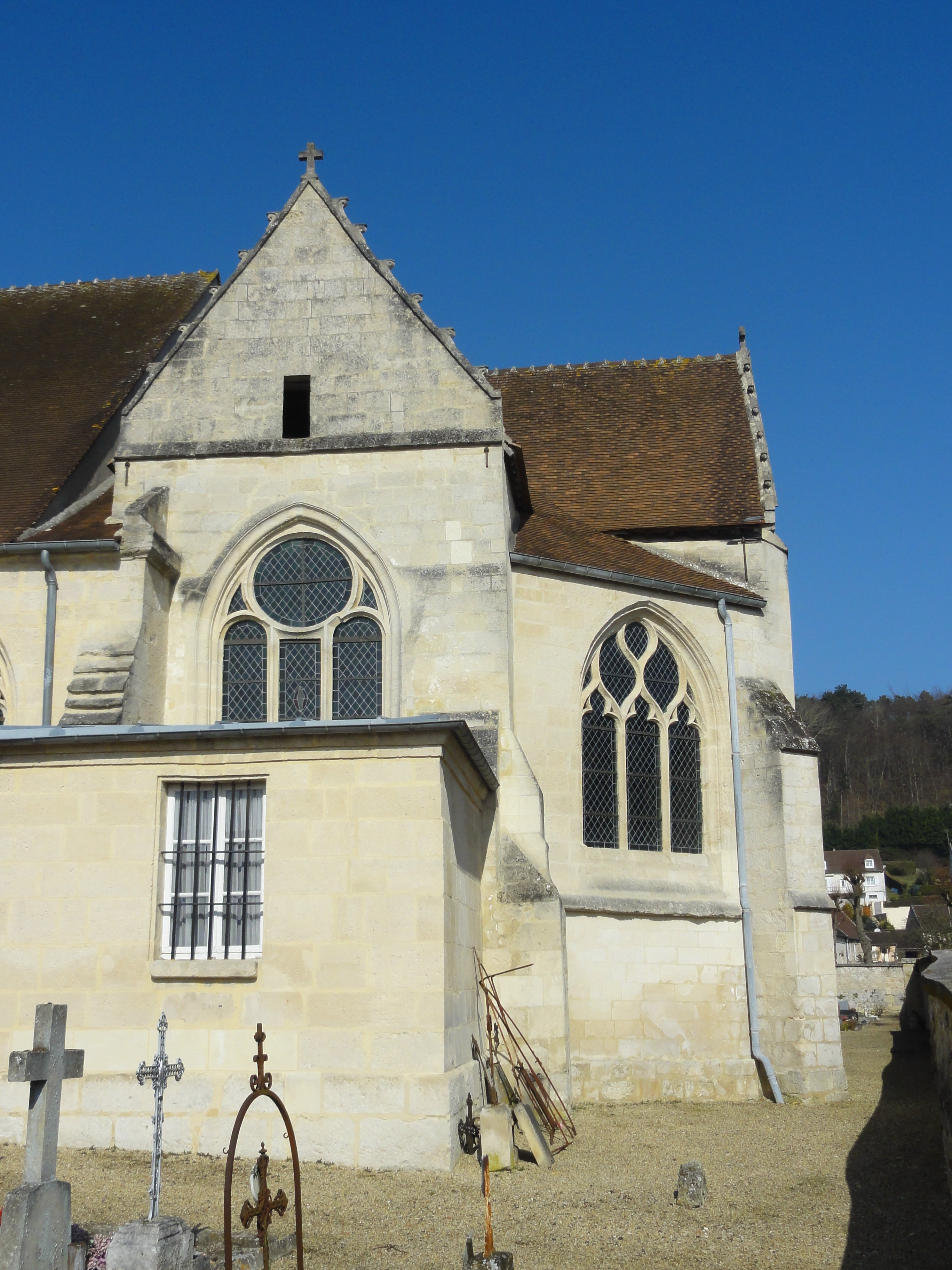 Vue sur le chœur depuis le sud.